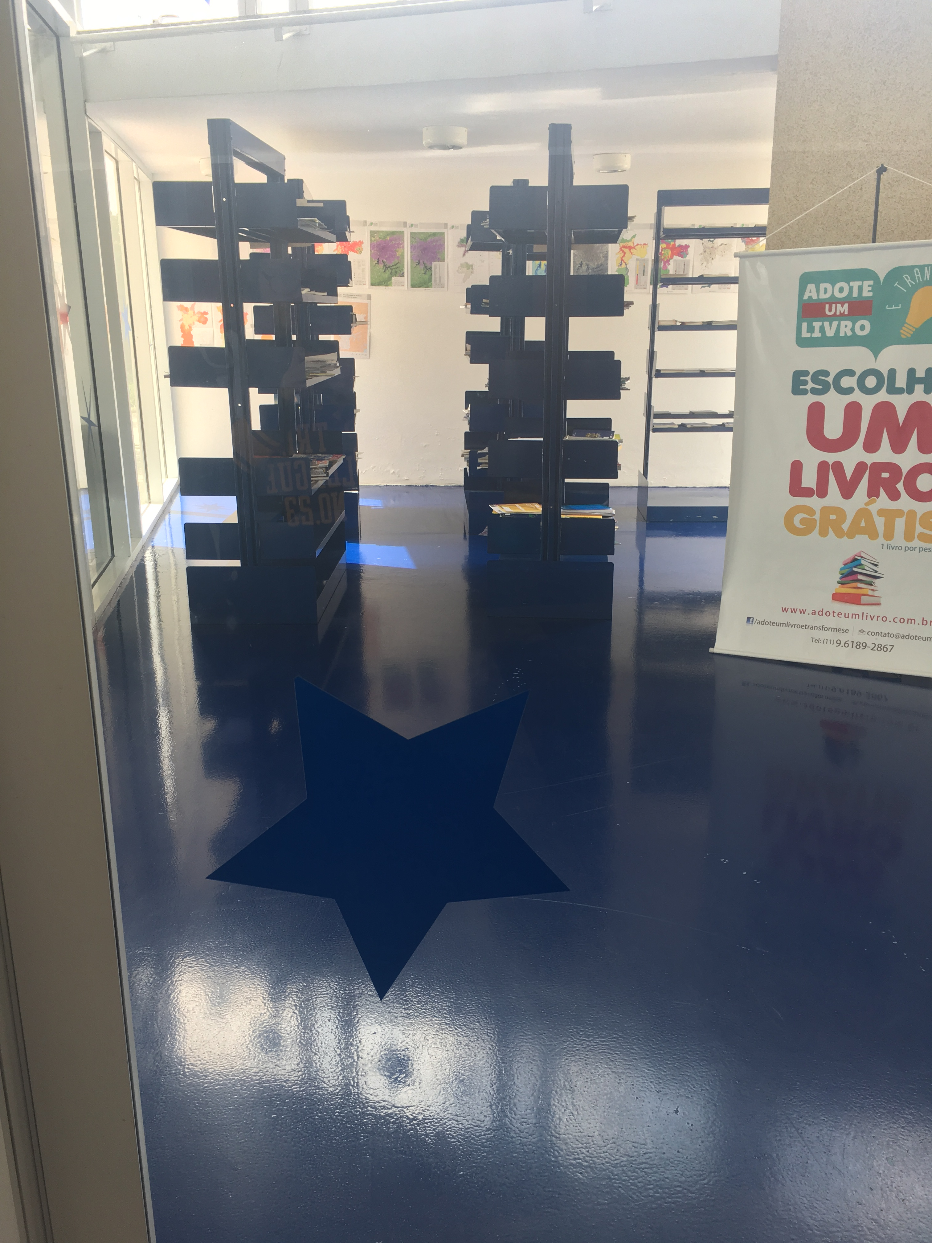 Estantes da biblioteca do Planetário do Carmo.